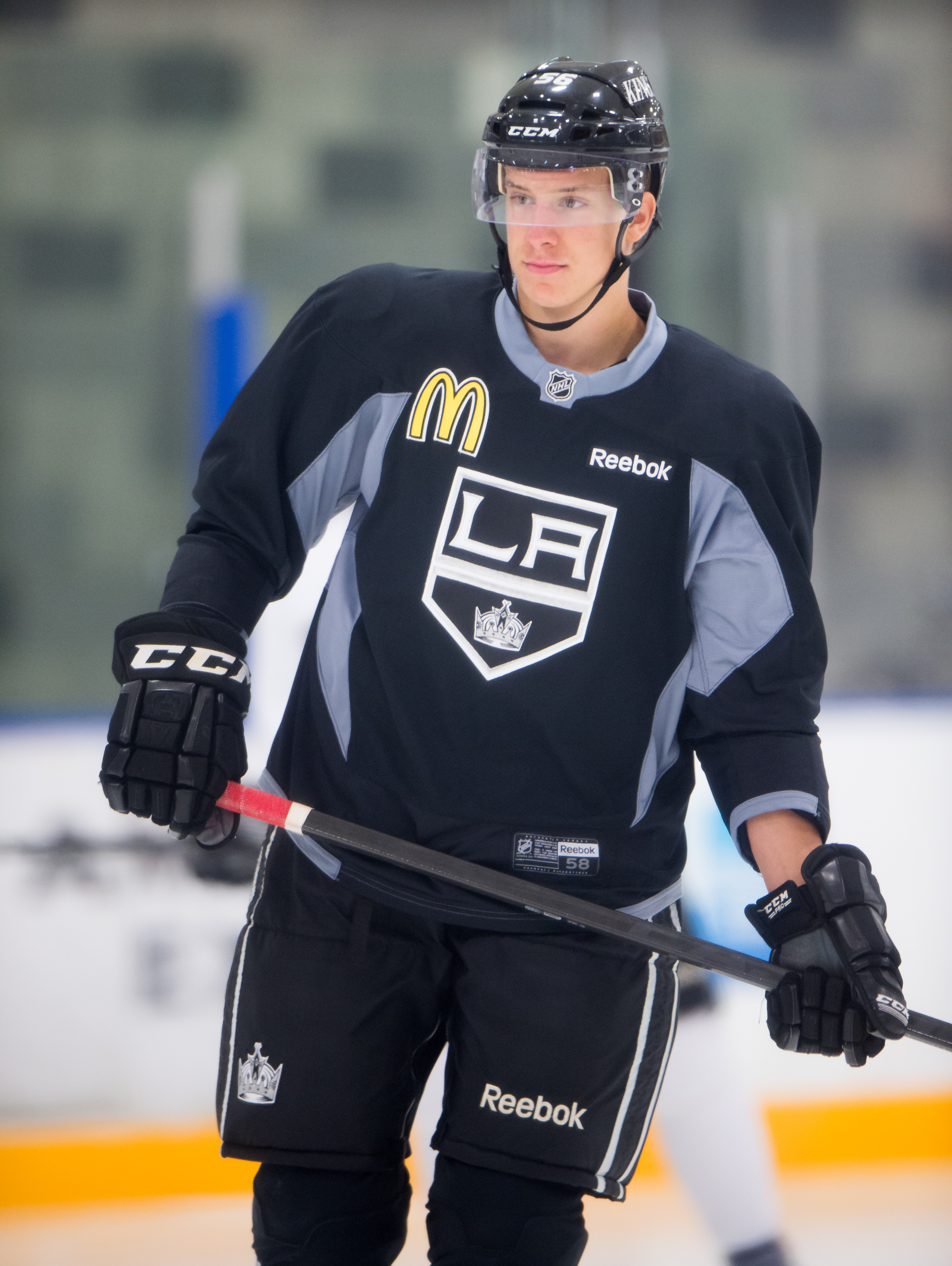 Kurtis MacDermid